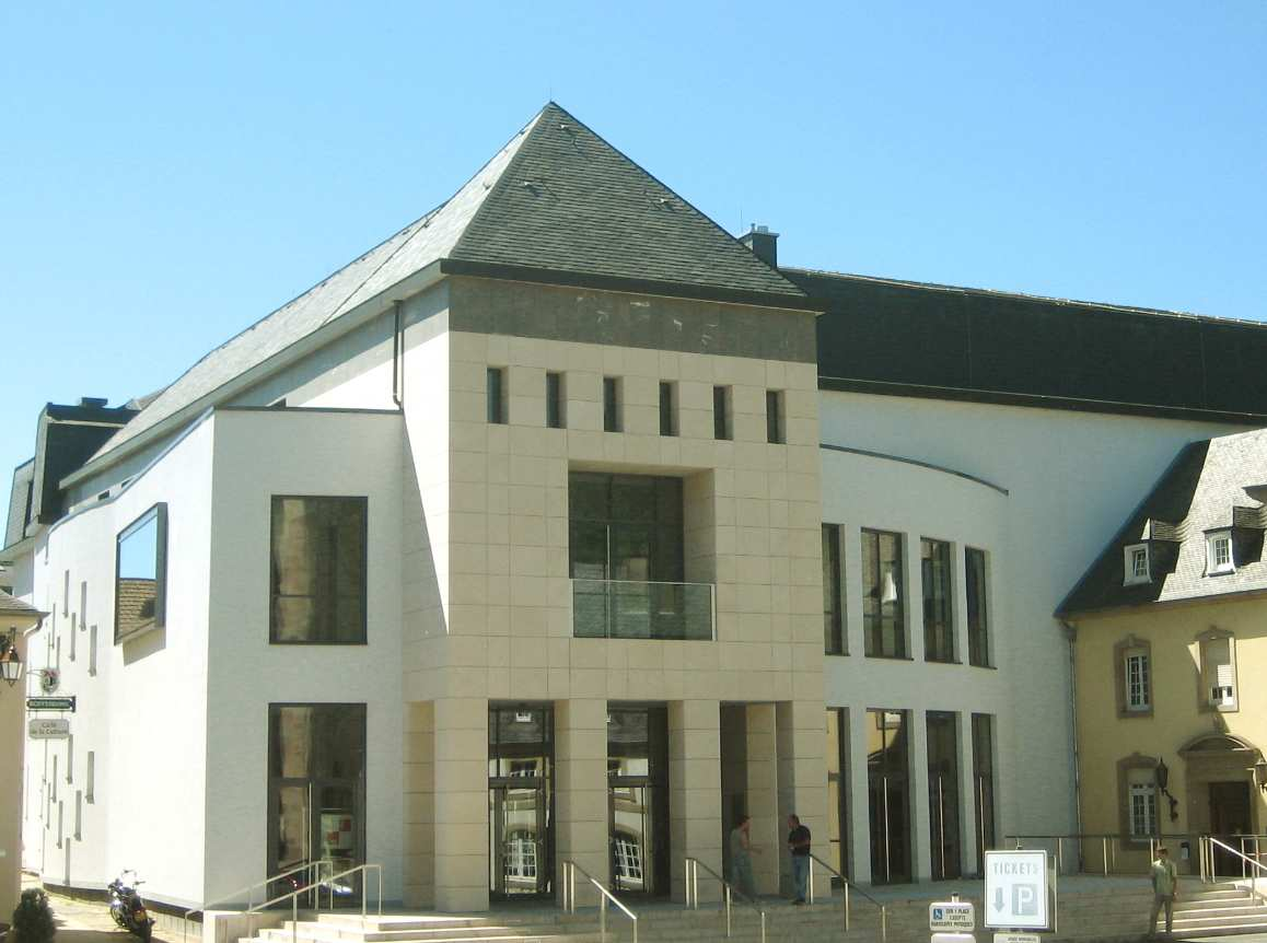 Den Trifolion zu Iechternach, am August 2008.